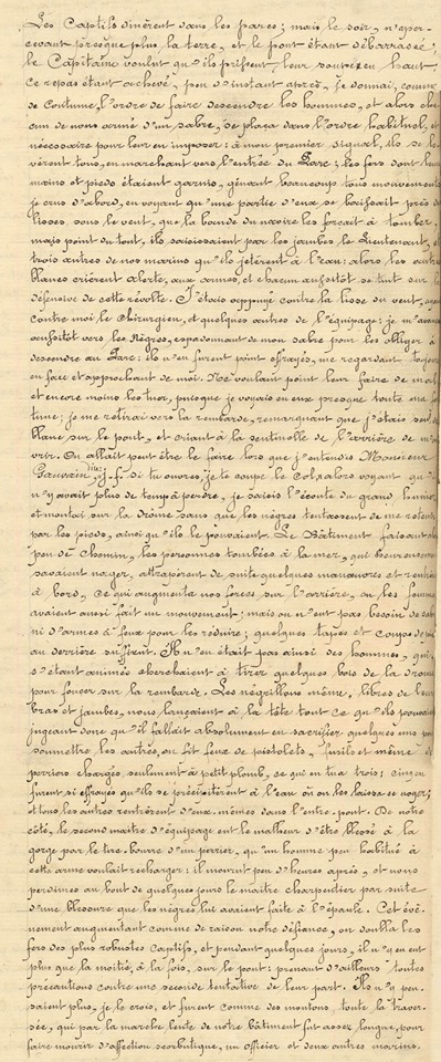 Extrait de Histoire des services à la mer et dans les ports de Claude Vincent Polony.